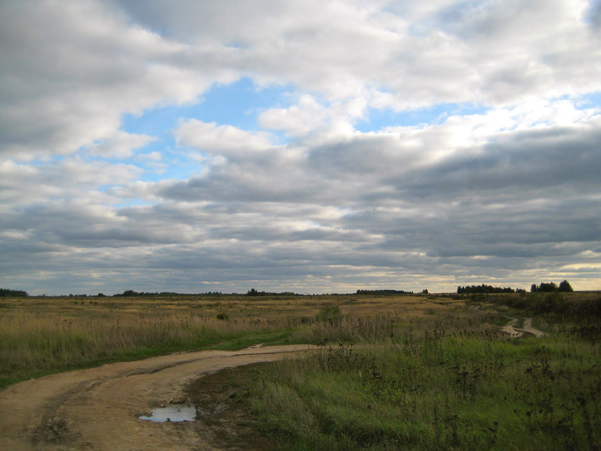 Бывшая столбовая дорога